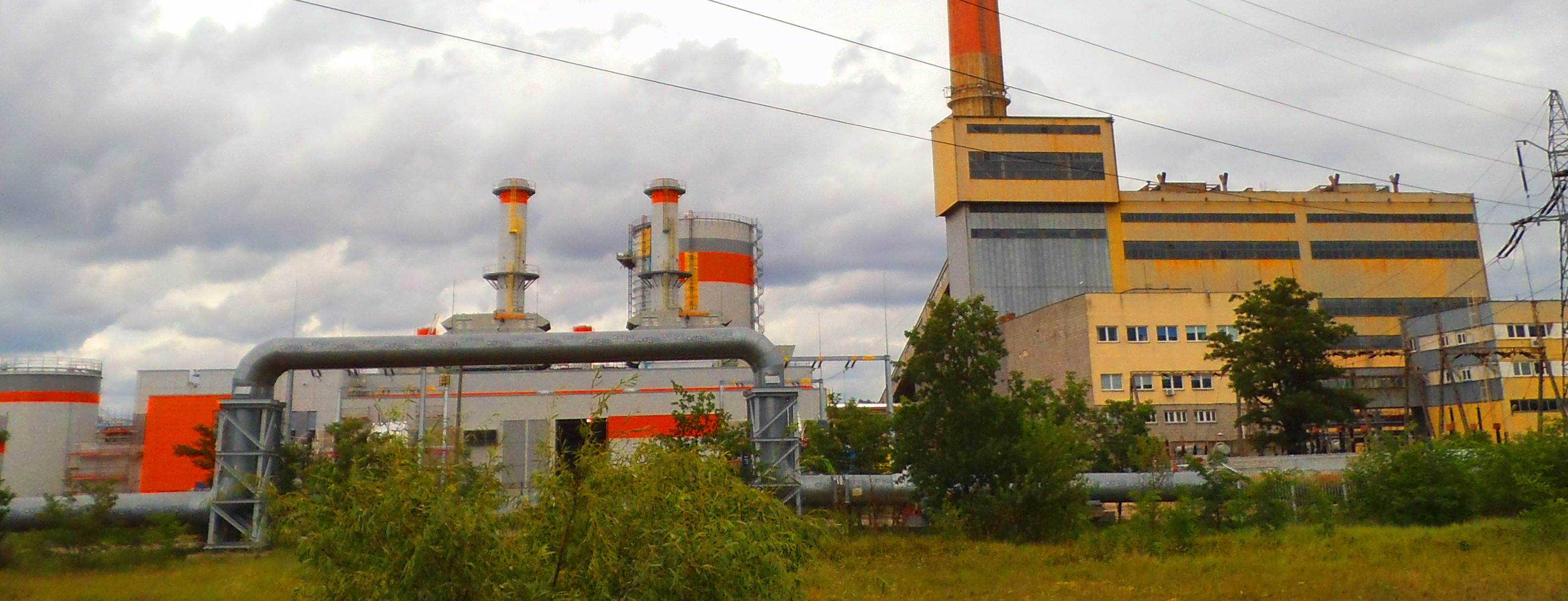 EDF Toruń S.A.